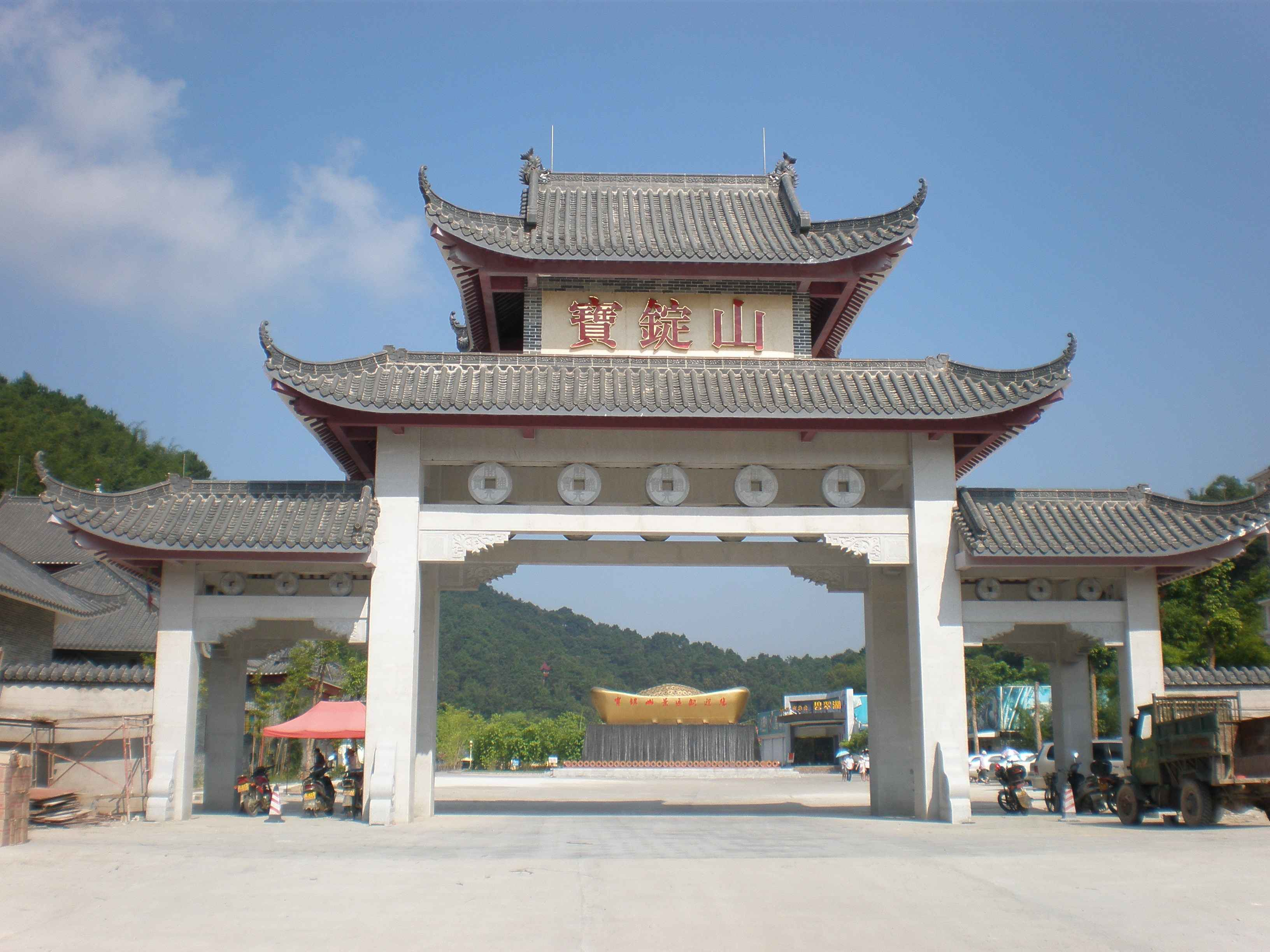 huaiji